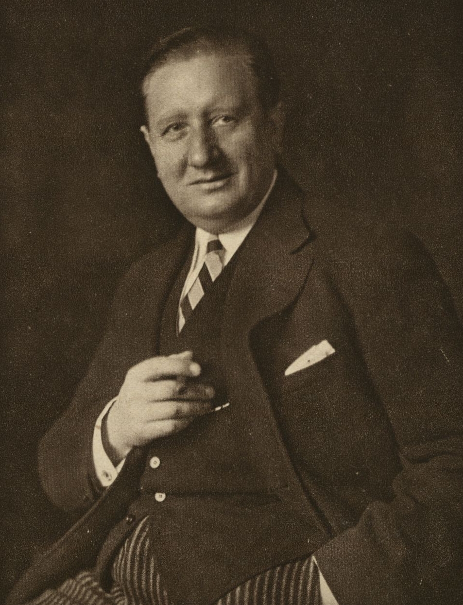 Der österreichische Opernsänger Carl Pfann